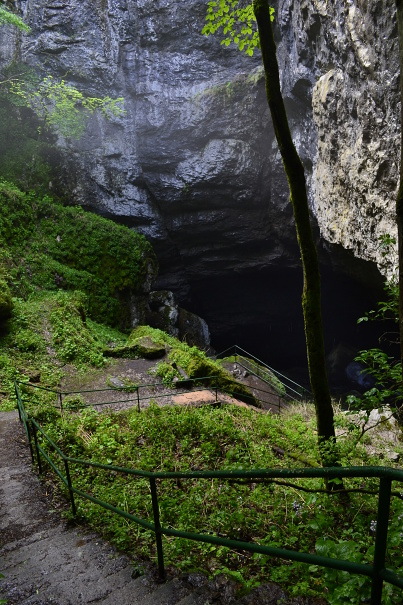 Silická planina